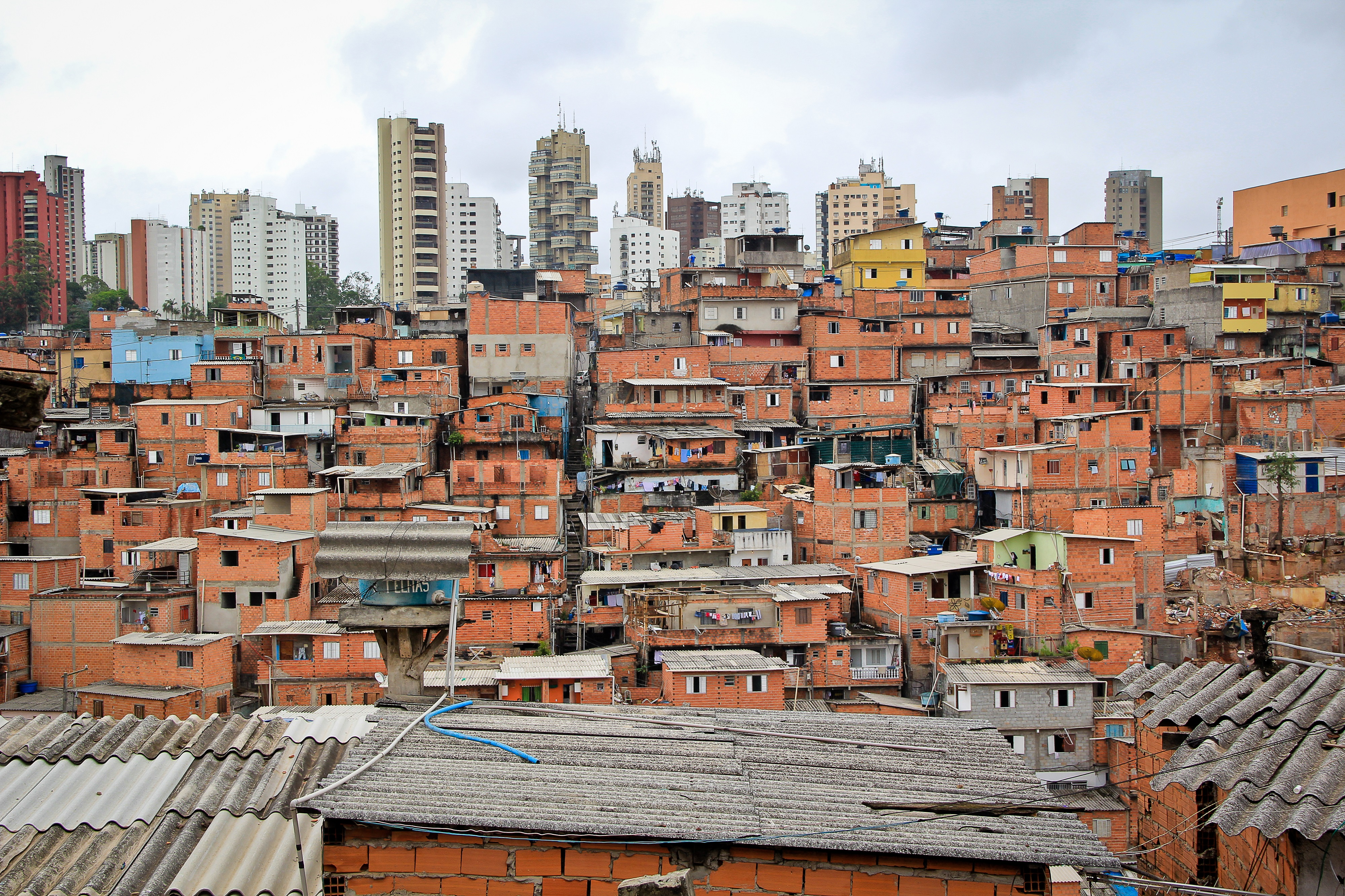 Arquitetura da cidade de Paraisópolis!